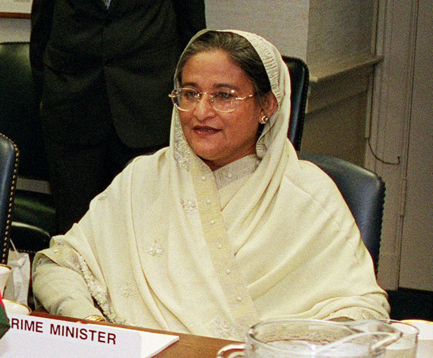 Bangladeshi Prime Minister Sheikh Hasina